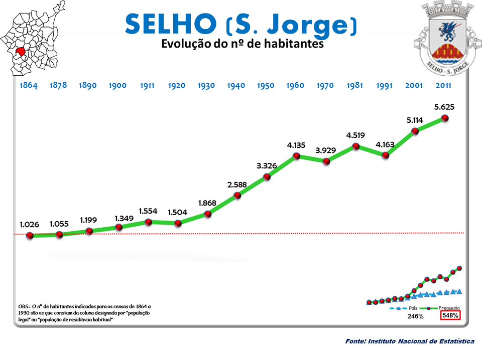 Censo 2011